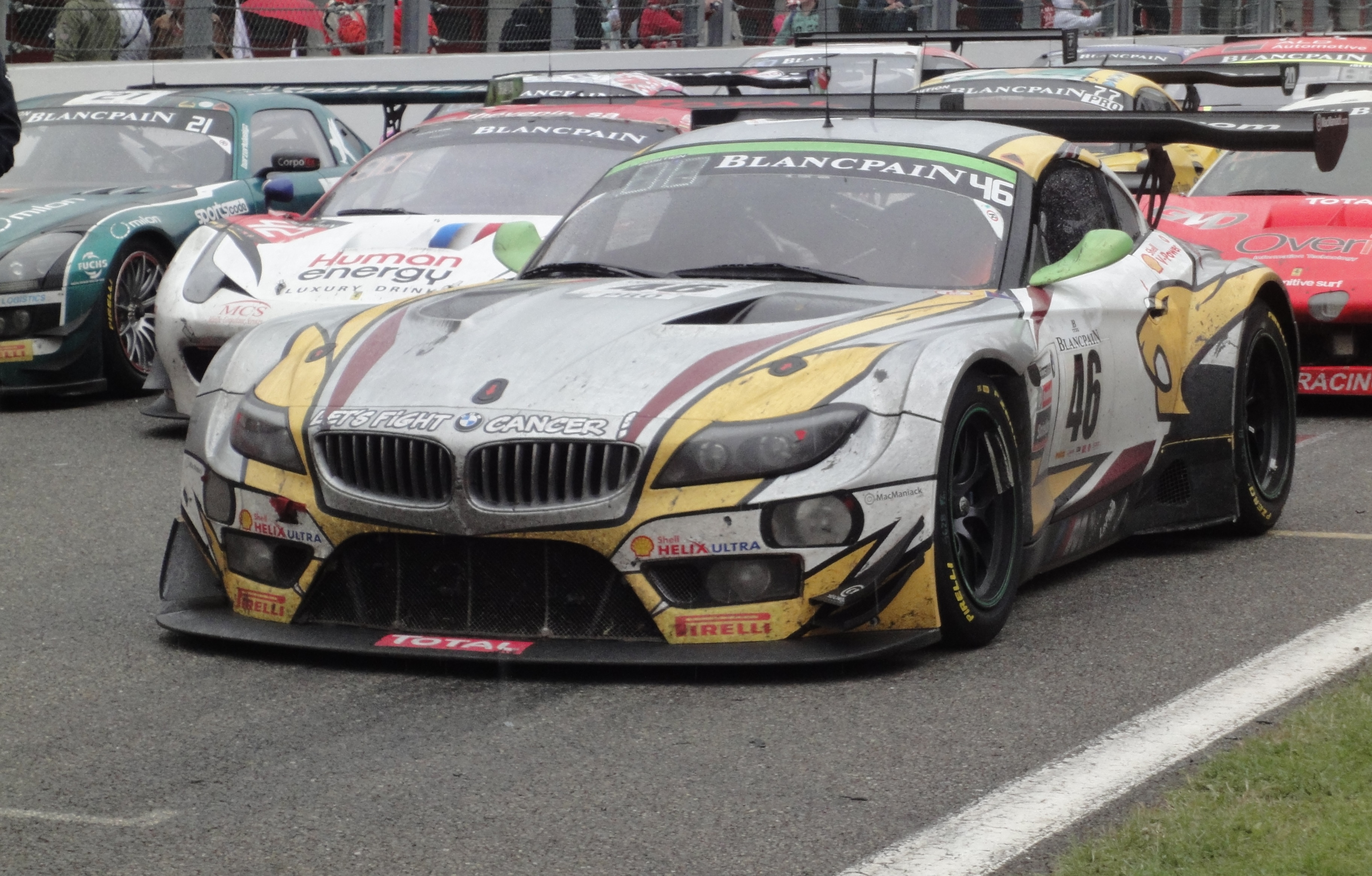 Z4 nach dem Sieg in Spa, abgestellt auf der Startgeraden gegenüber den Boxen